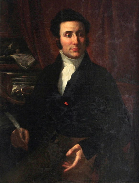 Jacques-François Gallay